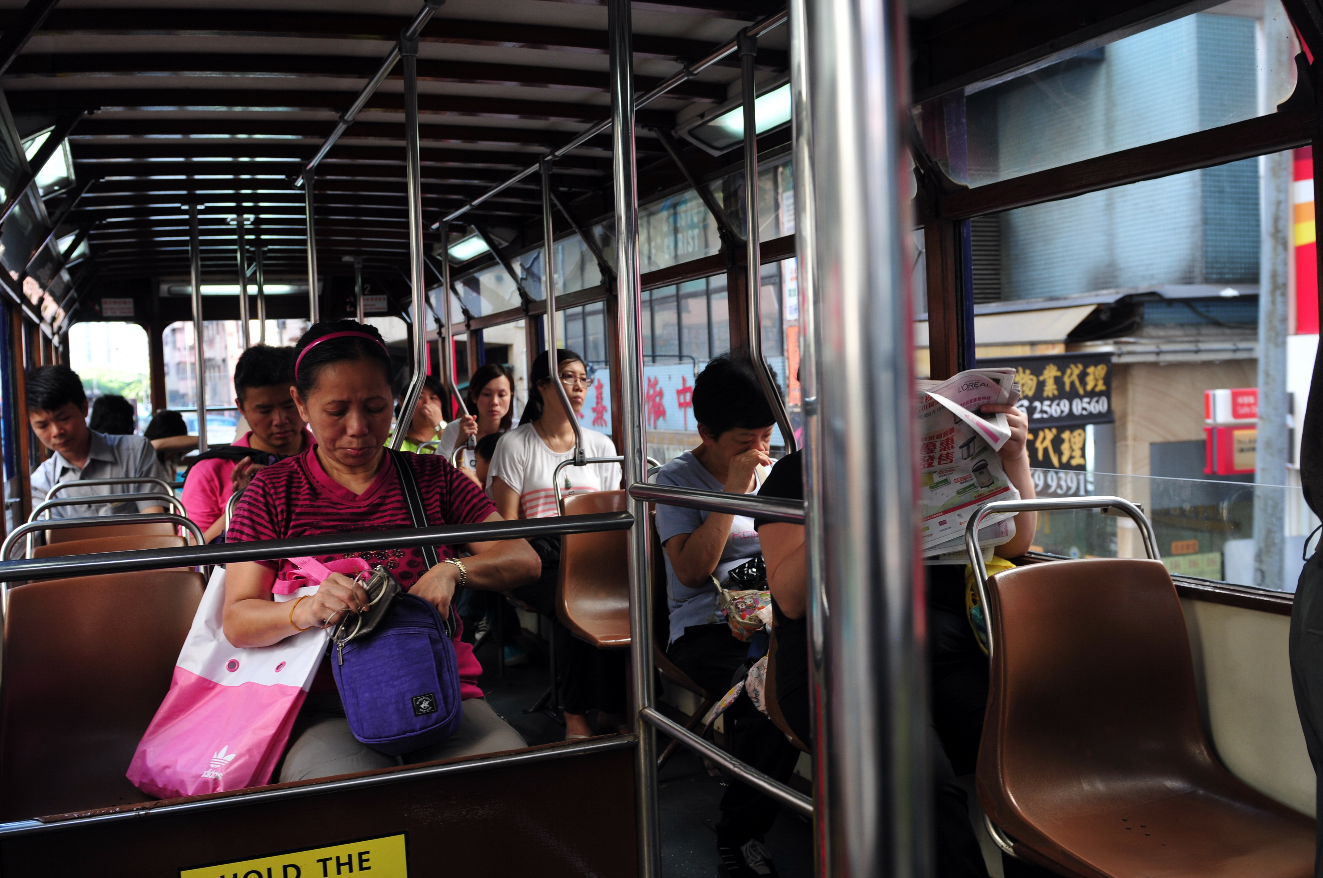 Wikimania 2013 Hongkong